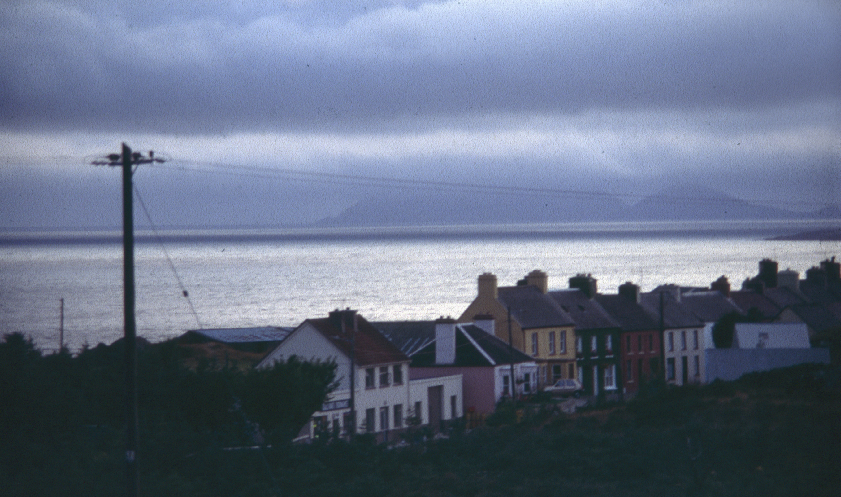 Eyeries